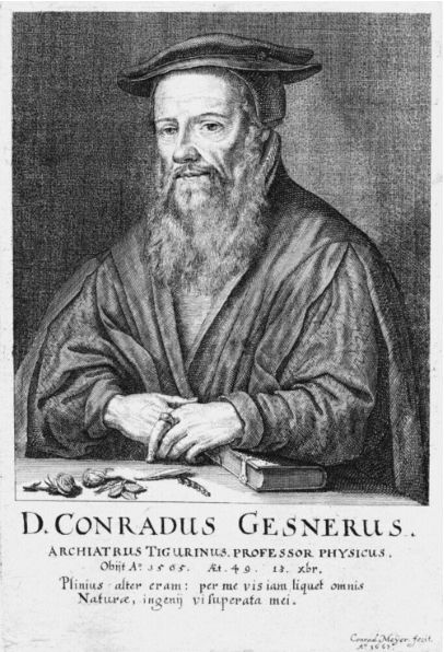 Conrad Gesner (1516-1565) schweizerischer Arzt, Naturforscher und Altphilologe